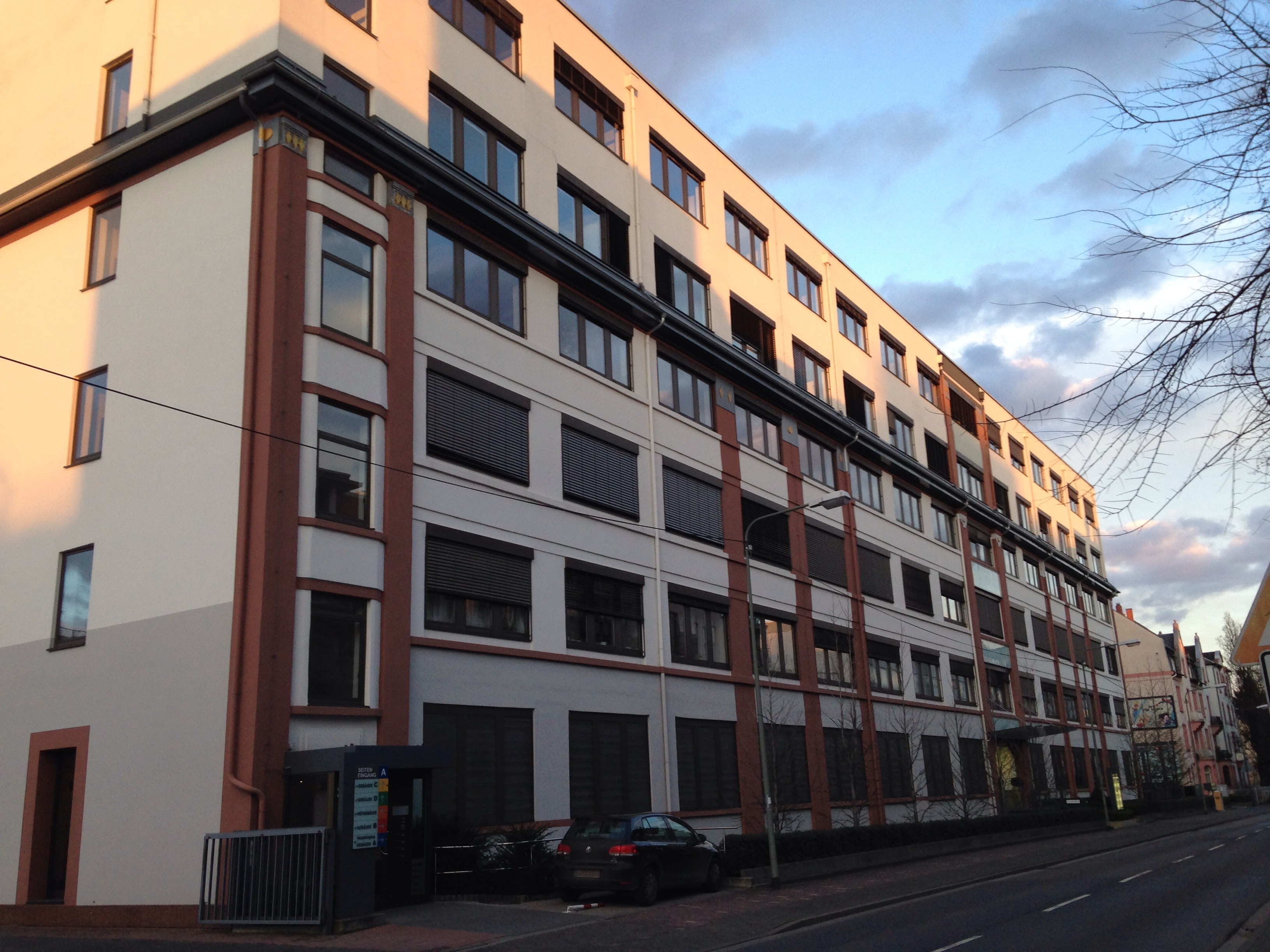 Reisebank Zentrale Frankfurt am Main